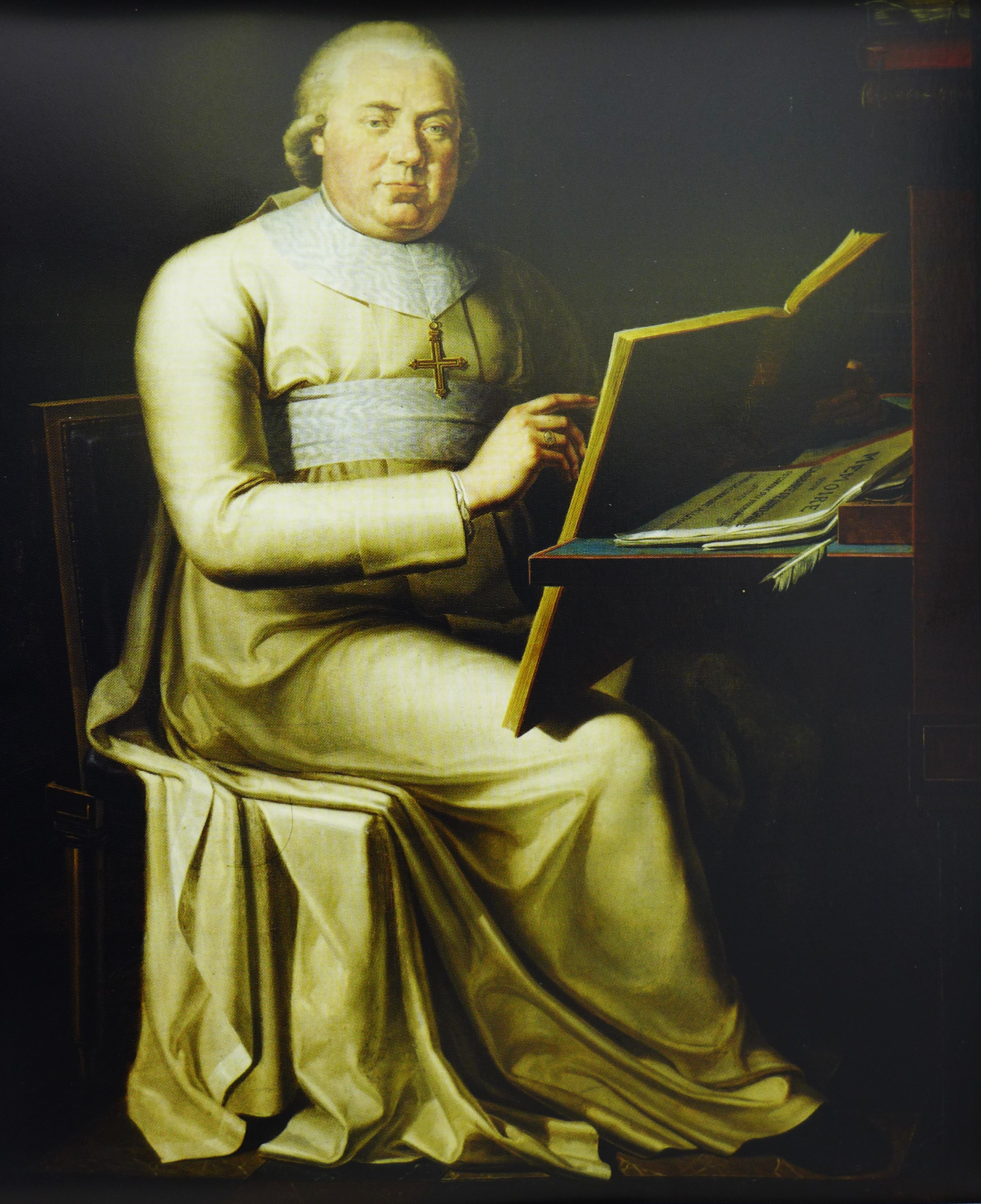 Jean Baptiste Bordier, letzter Abt (1784–1792) der Abtei Wadgassen (Stiftung saarländischer Kulturbesitz)